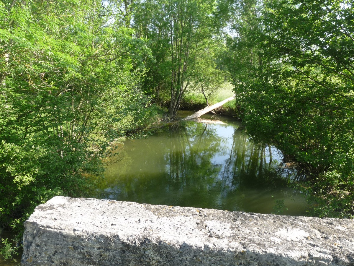 La Maury à St-Aulais-la-Chapelle (Charente, France). Pont sur la D.46